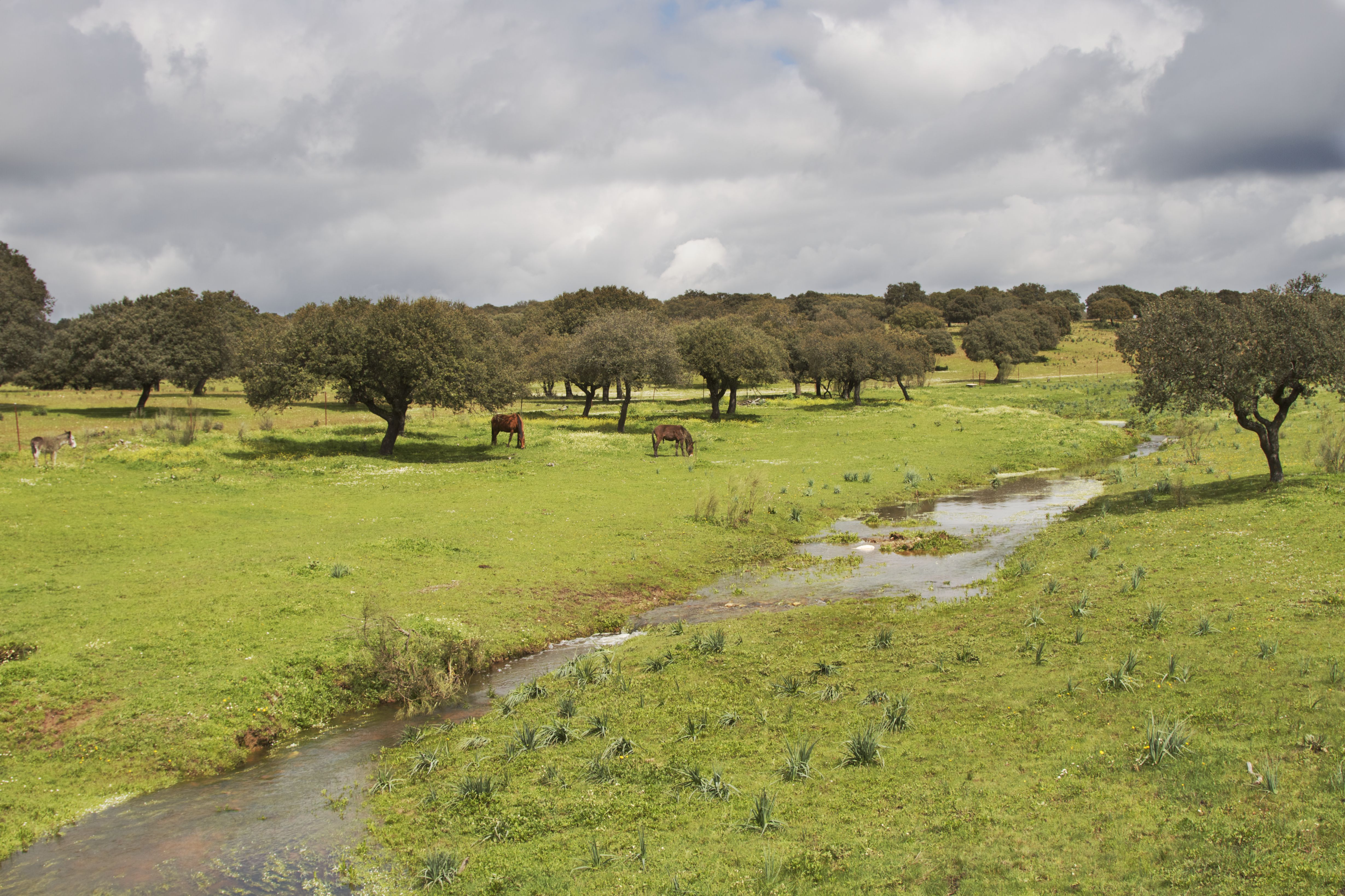 Dehesa con arroyo y caballos This is a photography of a Special Area of Conservation in Spain with the ID: ES4320077. Natura2000 entry, EEA entry